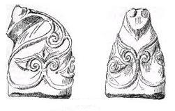 Alfil no conjunto de Ager